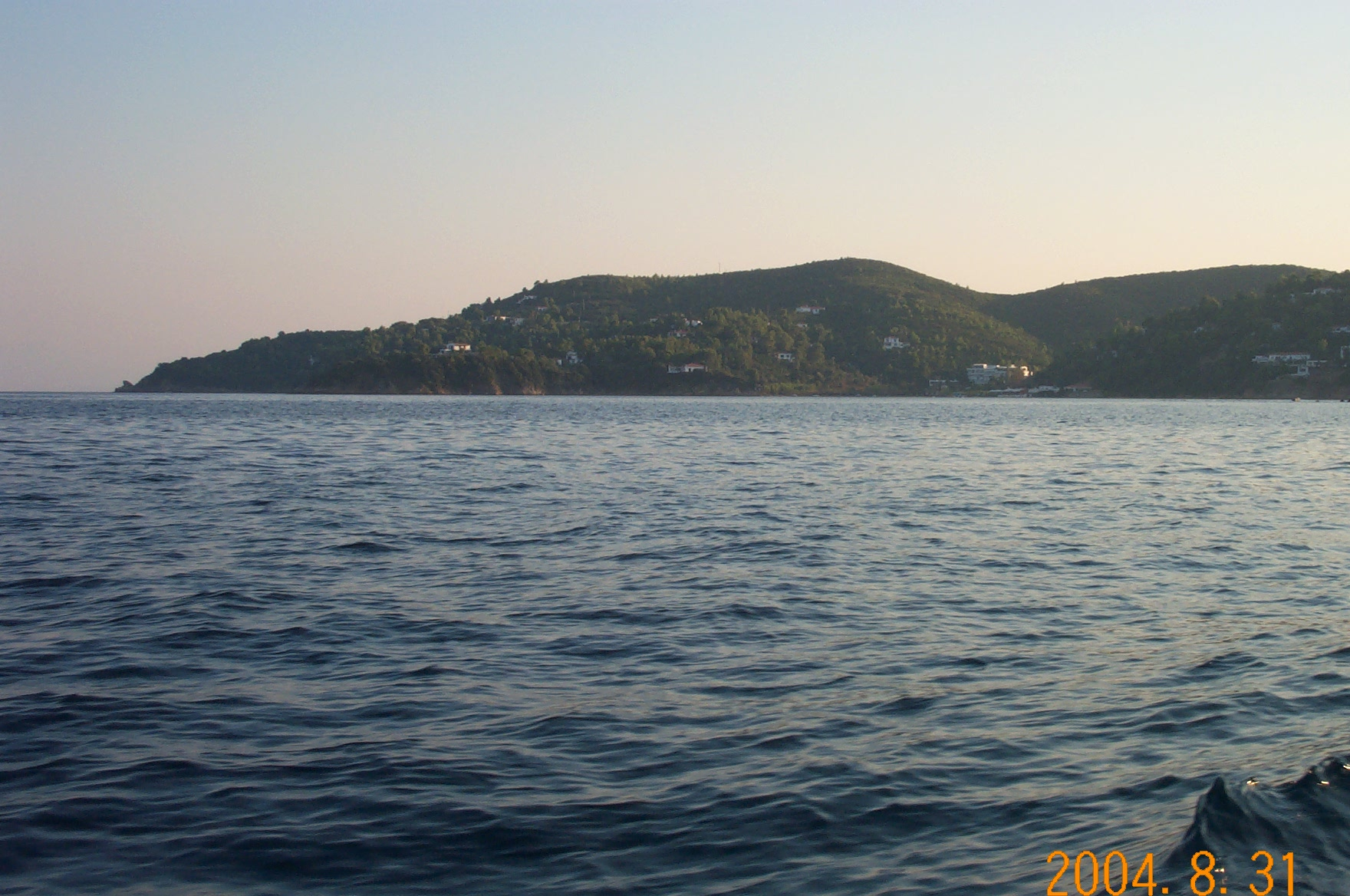 Bilden har jag tagit själv på min resa på Skiathos.